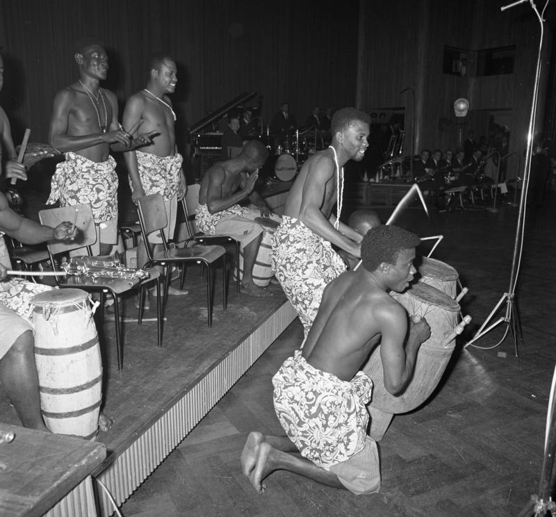 Afrika-Woche 1962 in der Beethovenhalle mit d. National-Ballett aus Guinea + d. Messenger Band aus Ghana